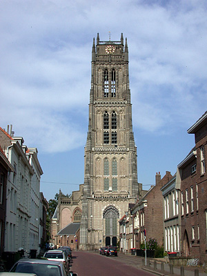 Zelf gemaakt, GNU